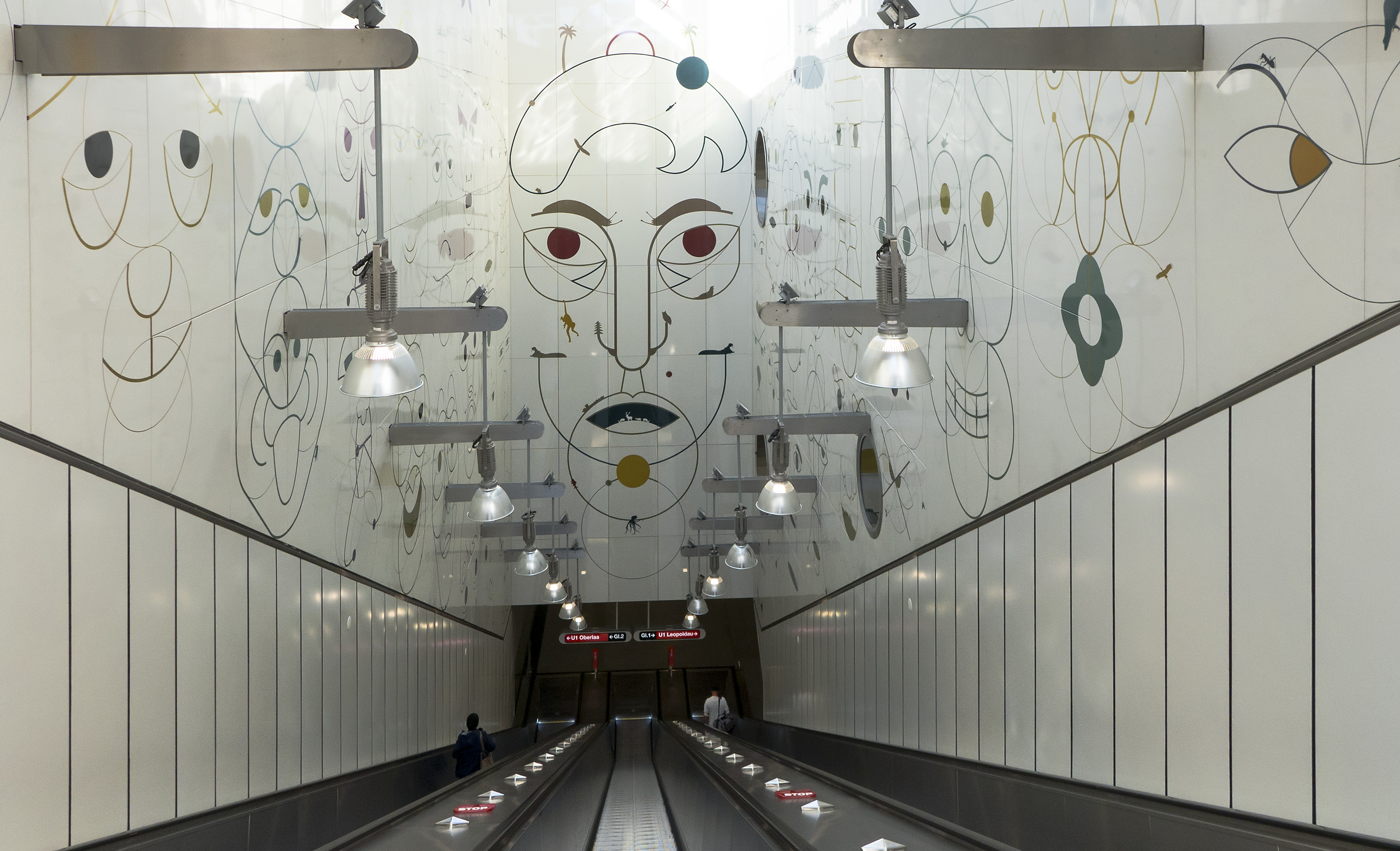 U-Bahn-Station Altes Landgut: Yves Netzhammer, "Gesichtsüberwachungsschnecken" Wandbild, Linie U1 in Wien 10, Verteilergeschoß